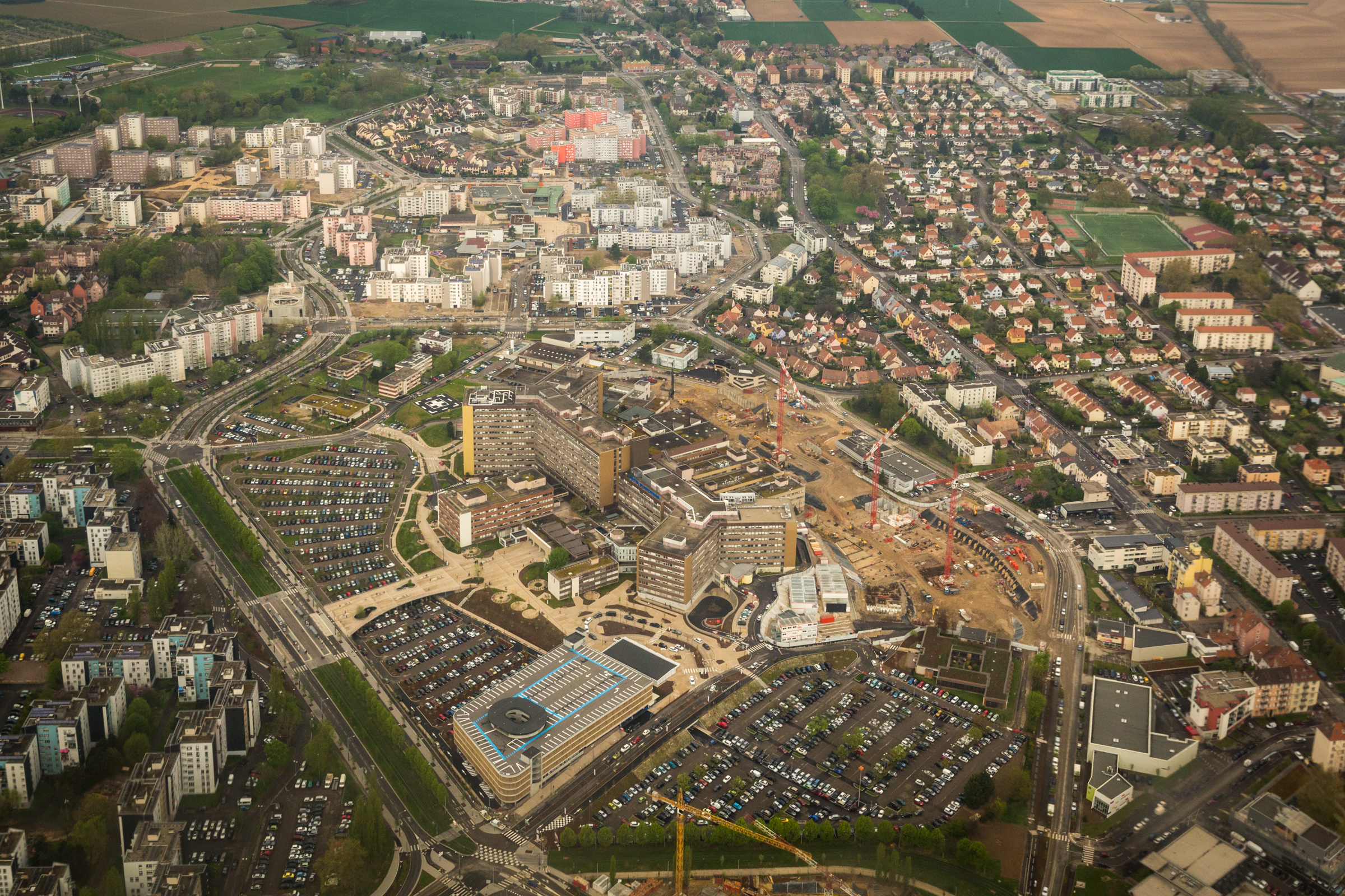 Hôpital de Hautepierre avril 2015